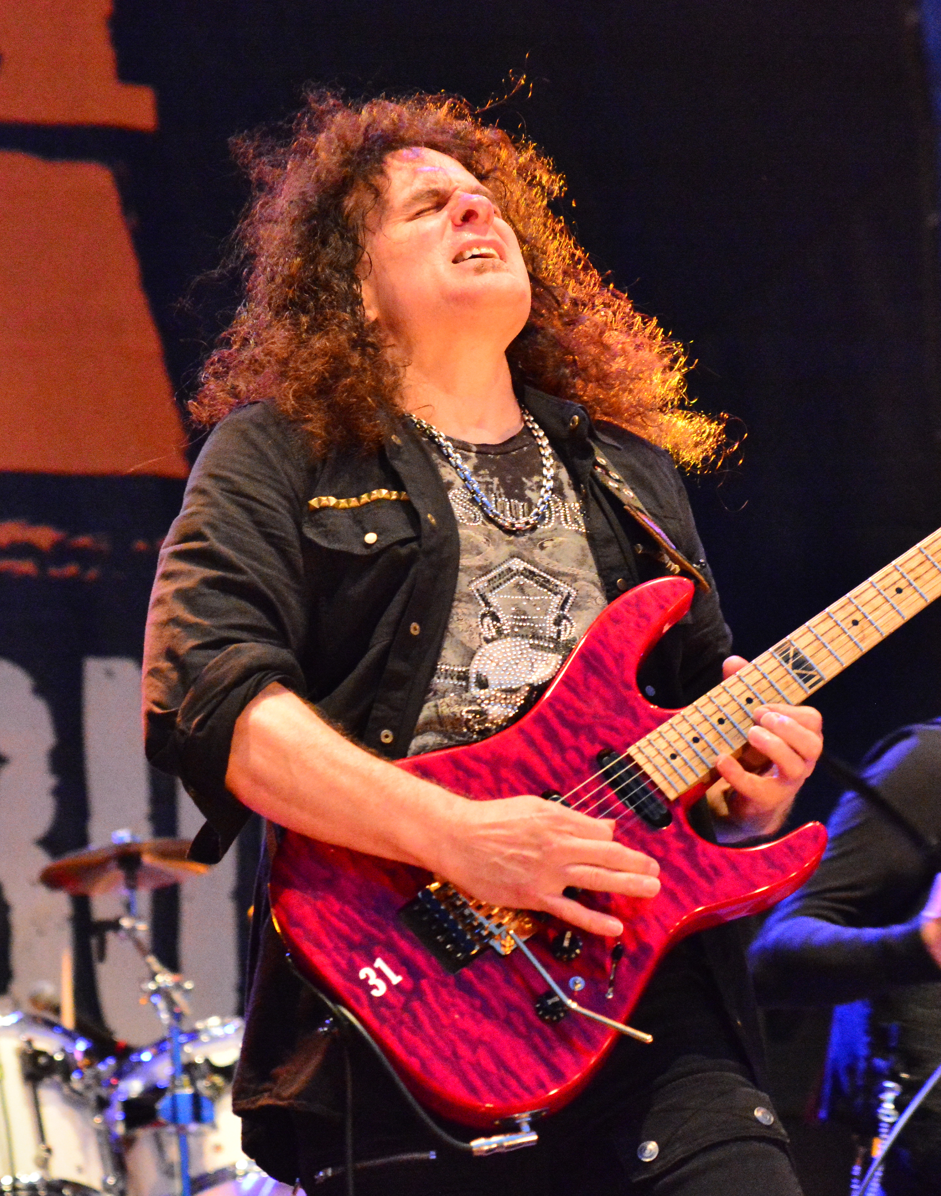 Vinnie Moore von UFO bei den „Hamburg Harley Days“